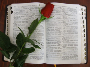 A Bible